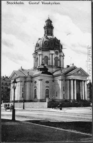 Kyrkan mot nordväst. Vykort. Kategori: (01) ExteriörerKyrkan mot nordväst. Vykort.